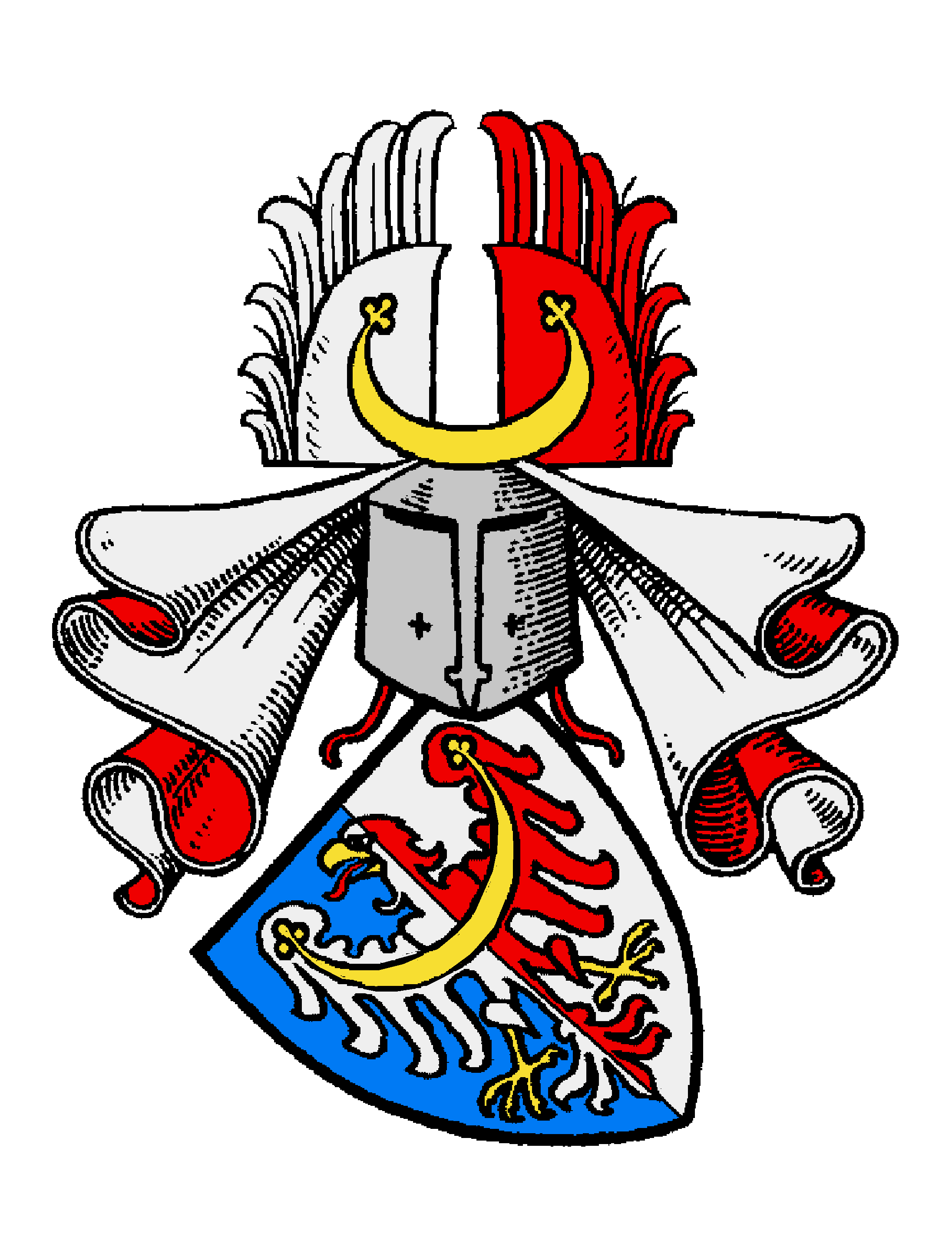 Variante des Wappens der Sahrer von Sahr (Seitenlinie des Zibrid Sahrer von Sahr auf Smilovice ab, die bereits im 16. Jahrhundert ausgestorben), auch: Schdiar von Schdiar, gelegentlich auch von Saar, tschechisch: Žďárští ze Žďáru und alttschechisch: Zdiárský ze Zdiáru, lateinisch: de Sora oder de Sara, ist der Name eines böhmischen Uradelsgeschlechts mit gleichen Vorfahren wie die Herren und Reichsgrafen von Kolowrat, die Herren von Janovic (deutsch von Janowitz) oder die Herren von Vimperk (deutsch von Winterberg). Verwandtschaft besteht auch mit den Rittern und Grafen Čejka von Olbramovic (deutsch Czejka von Olbramowitz) sowie mit den Rittergeschlechtern Dvořecký von Olbramovic (deutsch Dvoretzky von Olbramowitz), Podolský von Olbramowitz und Zrucký von Chřenovic. → File:Wappen von Saar (Sahrer von Sahr).png